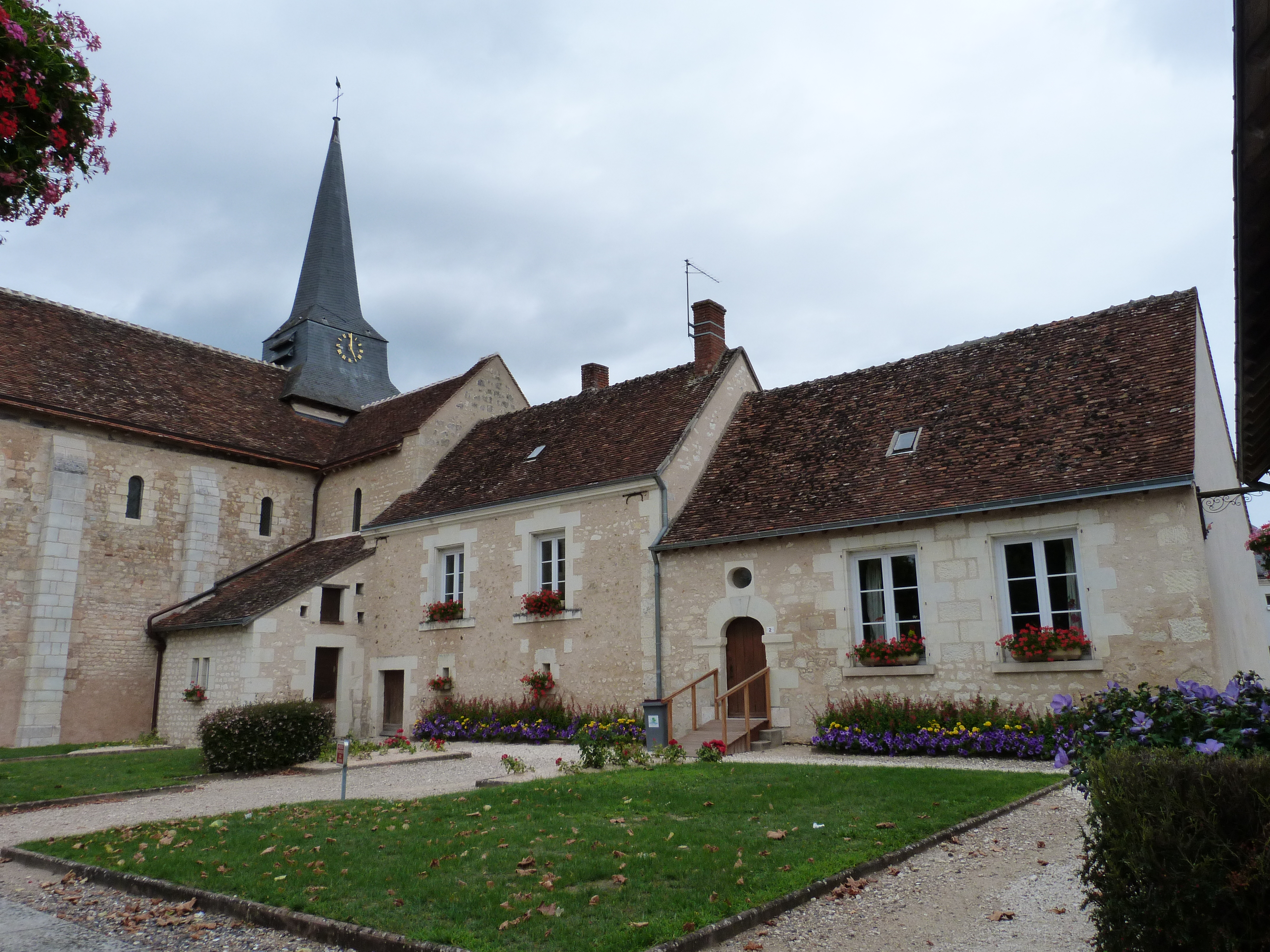 Église Saint-Pierre de Meusnes (Loir-et-Cher, France)